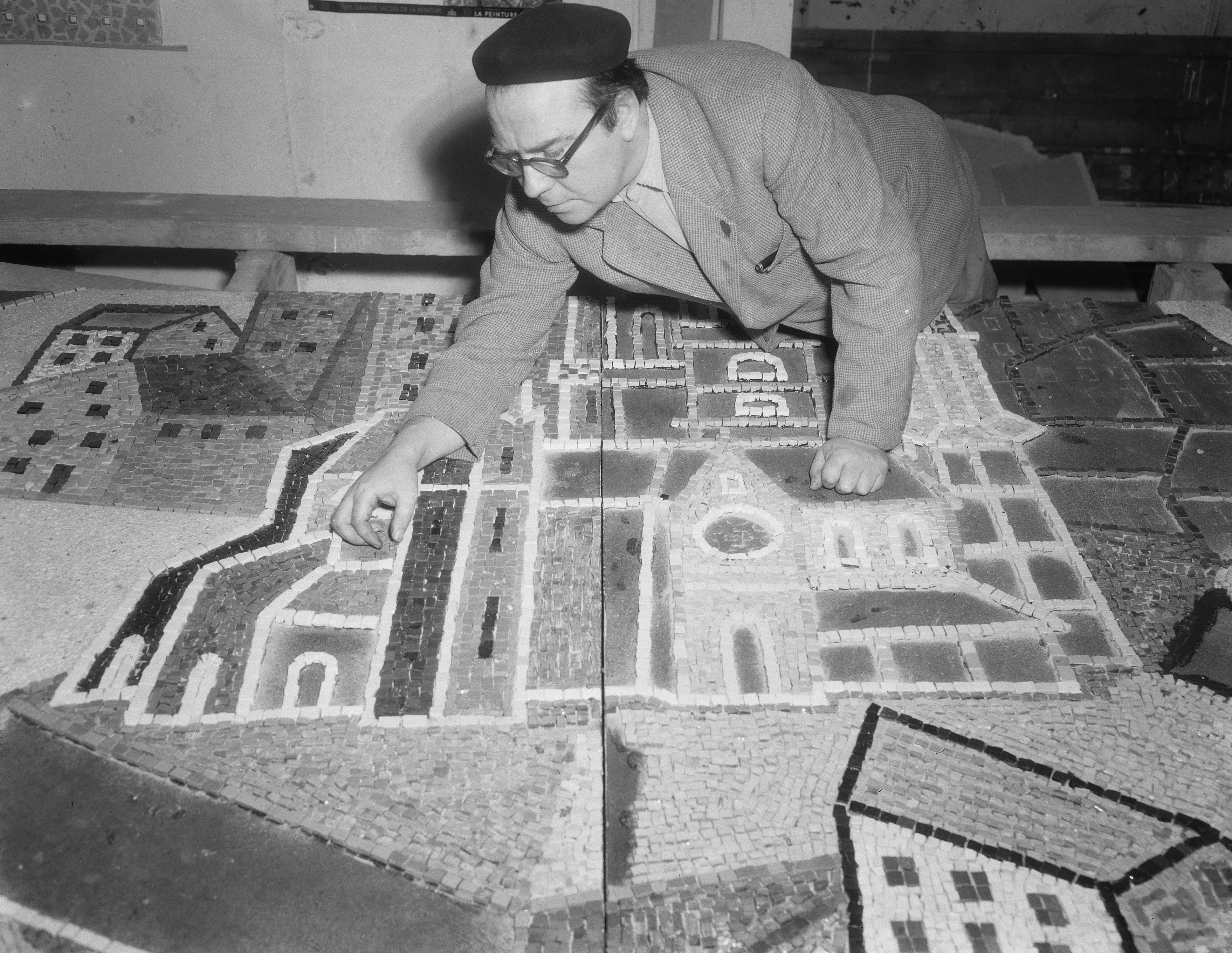 Collectie / Archief : Fotocollectie Anefo Reportage / Serie : [ onbekend ] Beschrijving : Louis van Roode maakt enorm mozaiek in Rotterdamse gevel Datum : 22 maart 1954 Locatie : Rotterdam, Zuid-Holland Trefwoorden : gevels Persoonsnaam : Roode, Louis van Fotograaf : Duinen, […] van / Anefo Auteursrechthebbende : Nationaal Archief Materiaalsoort : Negatief (zwart/wit) Nummer archiefinventaris : bekijk toegang 2.24.01.04 Bestanddeelnummer : 906-3464